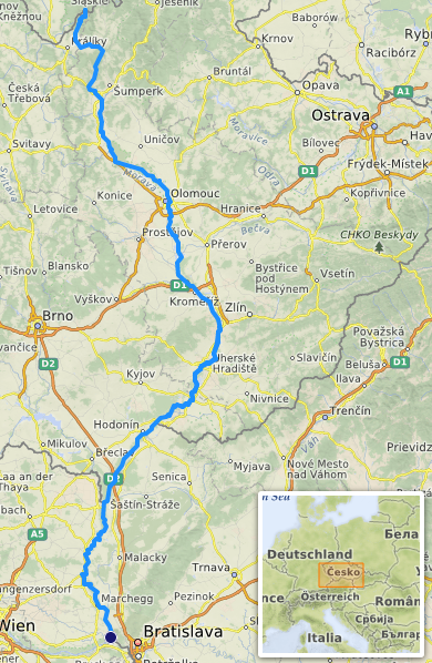 carte réalisée sur umap [1] This map may be incomplete, and may contain errors. Don't rely solely on it for navigation.